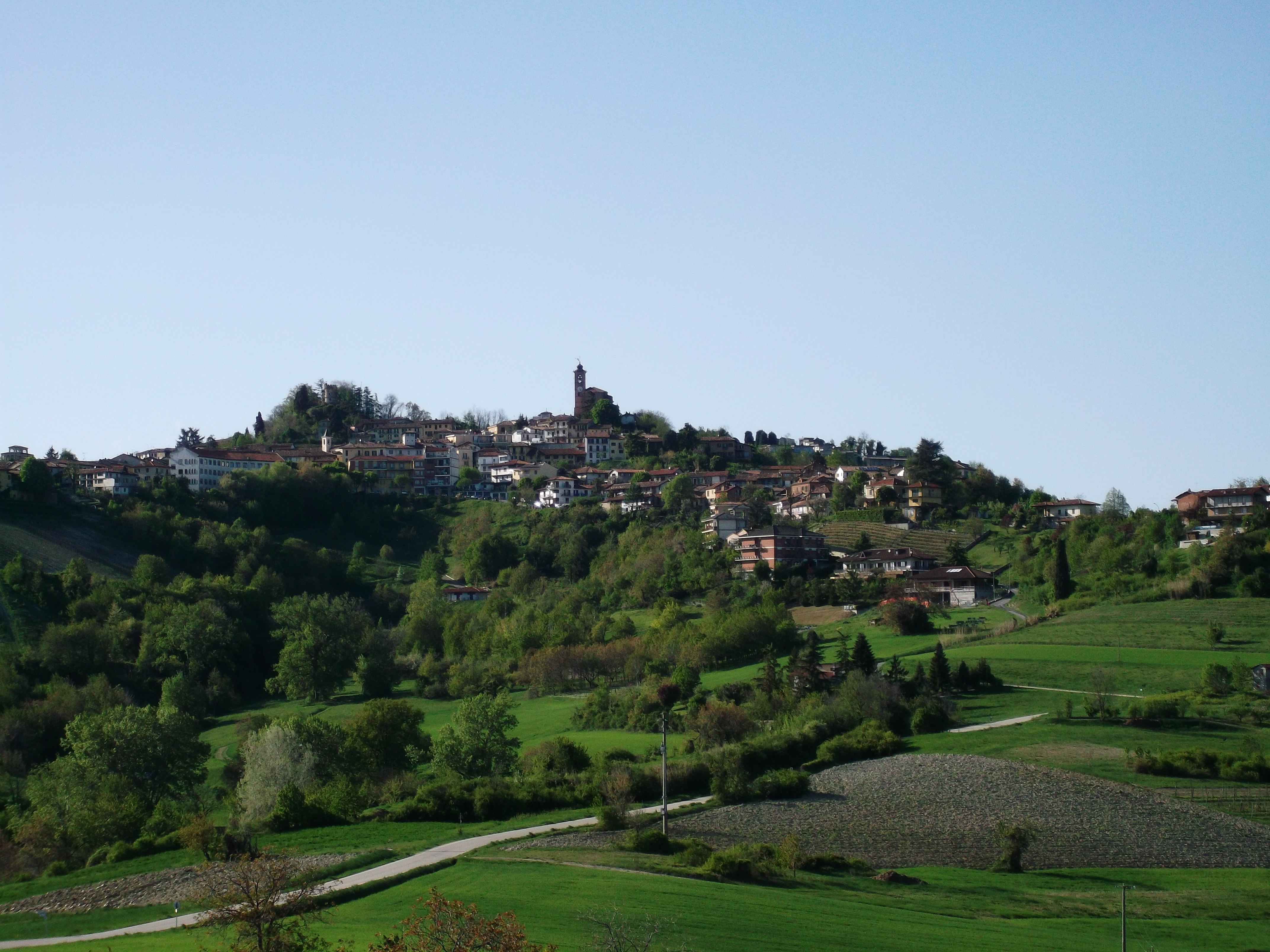 Comune di Cocconato, Asti (Italia)